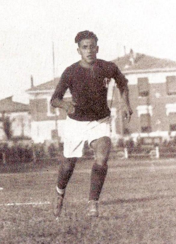 Bologna, stadio Sterlino, 11 ottobre 1925. L'attaccante bolognese Giuseppe Della Valle in azione nel corso della sfida tra Bologna e Novara (4-1) valevole per la 2ª giornata del campionato italiano di Prima Divisione 1925-26, Lega Nord, girone A.